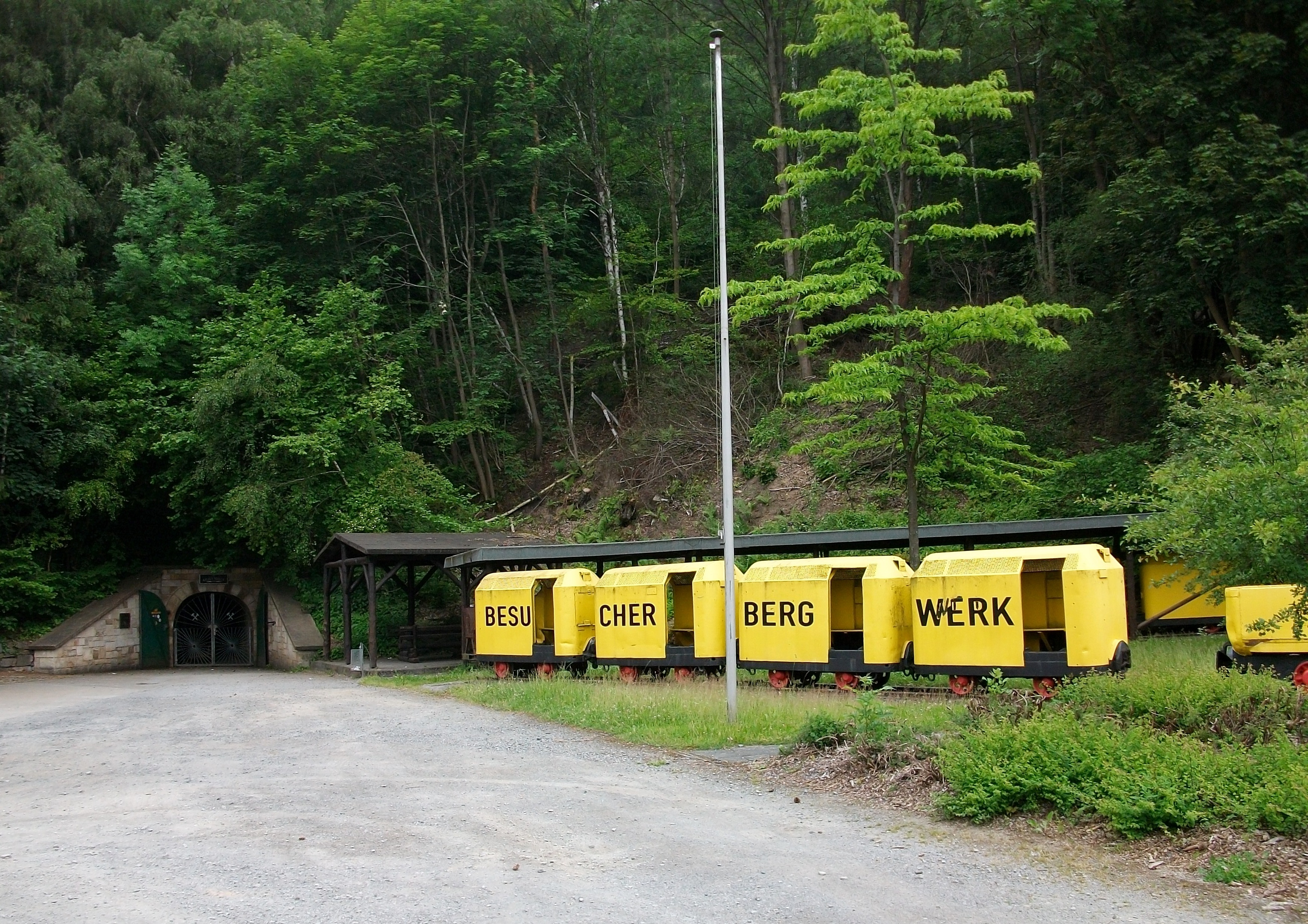 Marsberg, Kilianstollen (Germany)